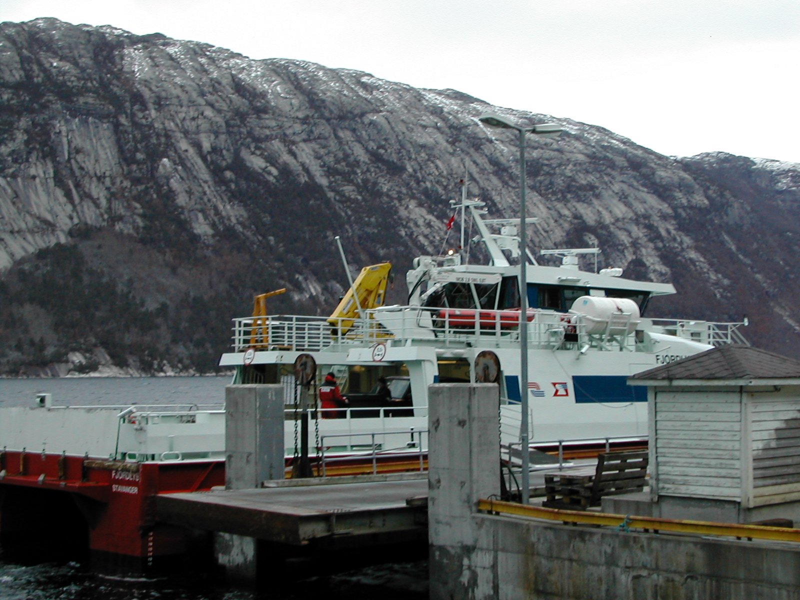 Hurtigbåten Fjordlys til kai i Flørli. Var på vei inn Lysefjorden.